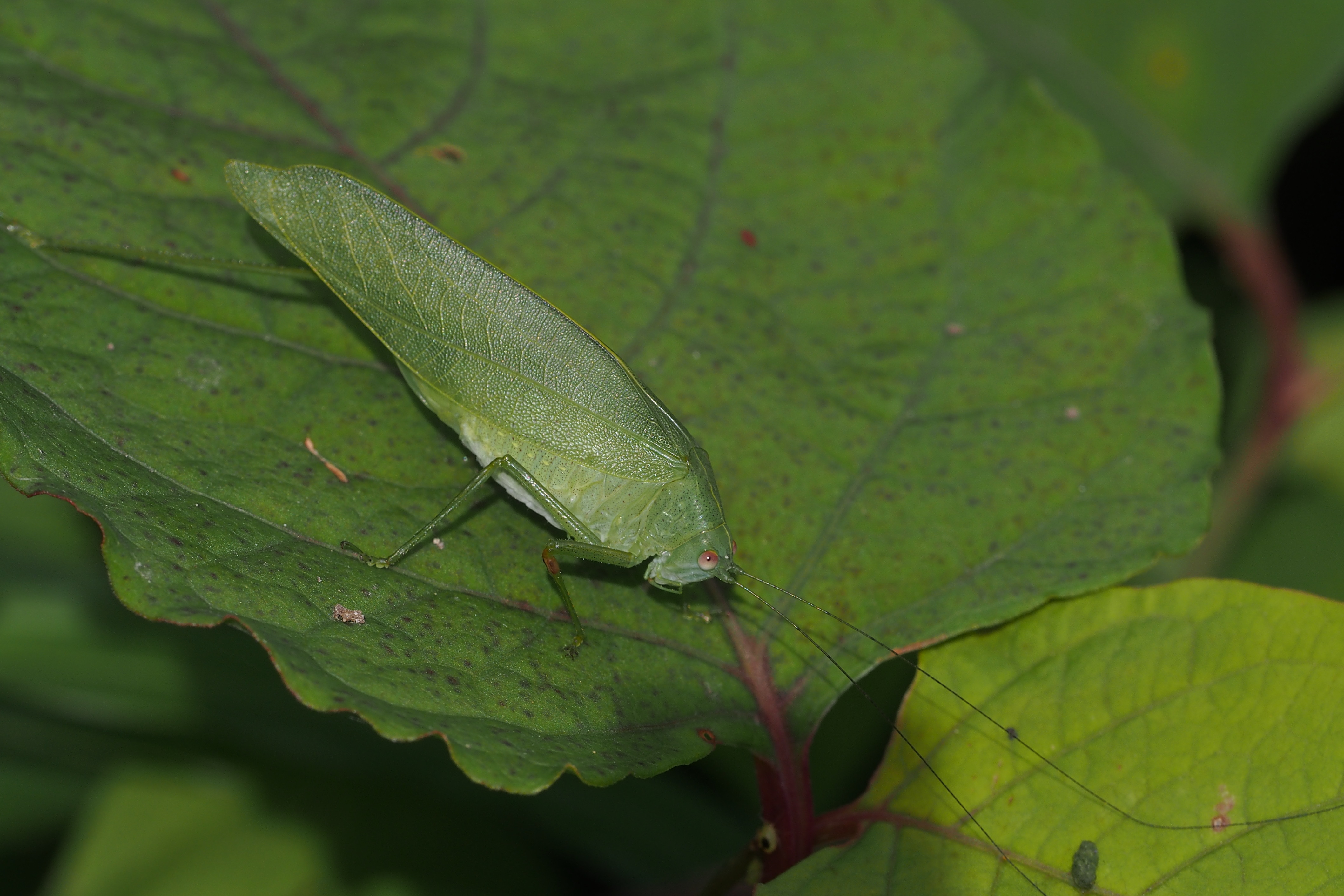 Phaulula macilenta in Japan.